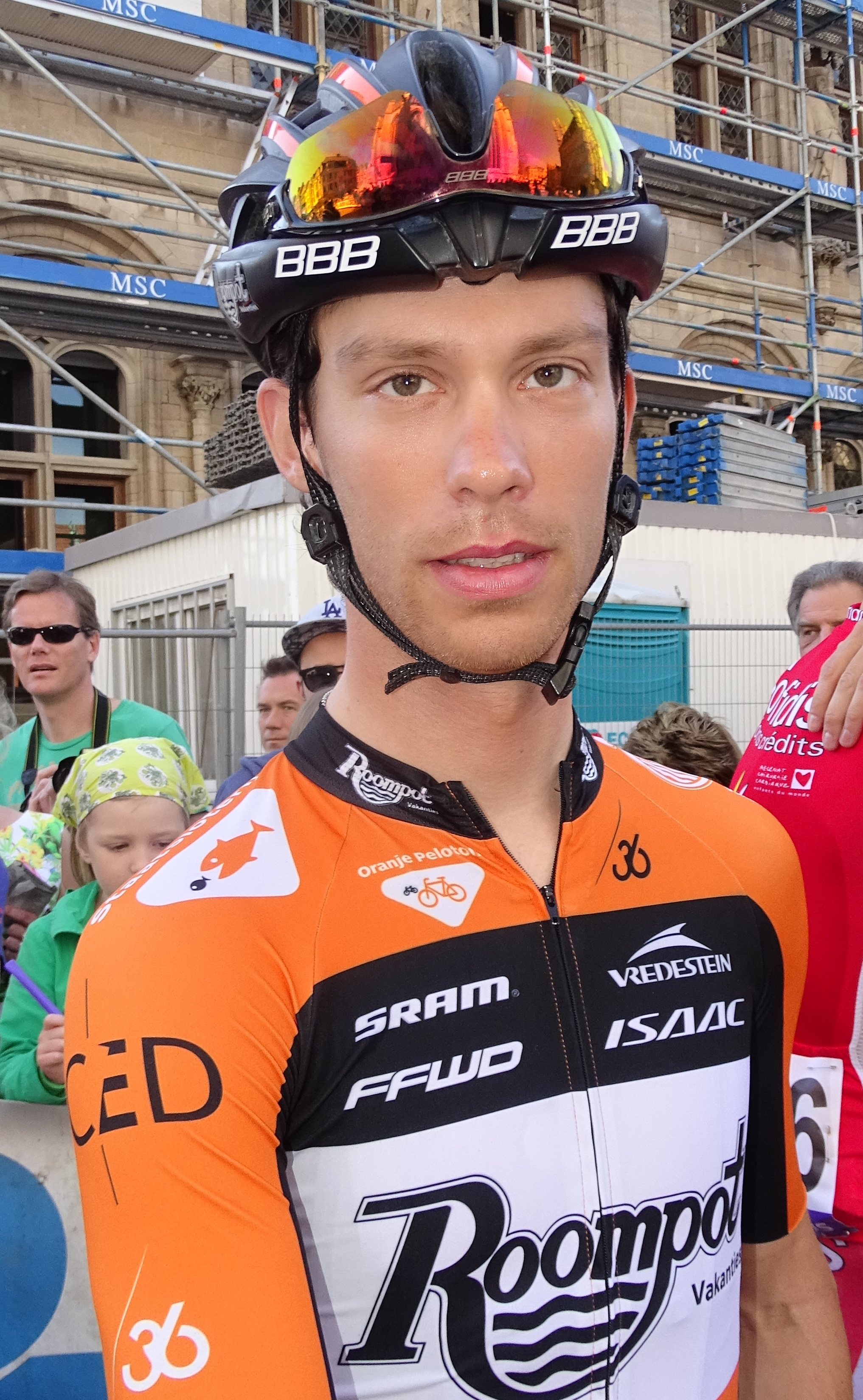 Reportage réalisé le mercredi 15 avril à l'occasion du départ de la Flèche brabançonne 2015 à Louvain, Belgique.